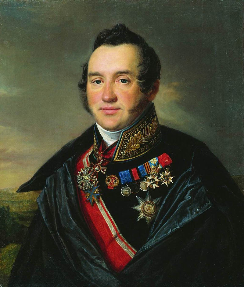 Николай Васильевич Арсеньев (1789-1847), участник Бородинского сражения, взятия Парижа, был гражданским губернатором Бессарабии и тайным советником; сын Василия Дмитриевича Арсеньева (1755-1826) и Евдокии Александровны Соймоновой (1754-1819).